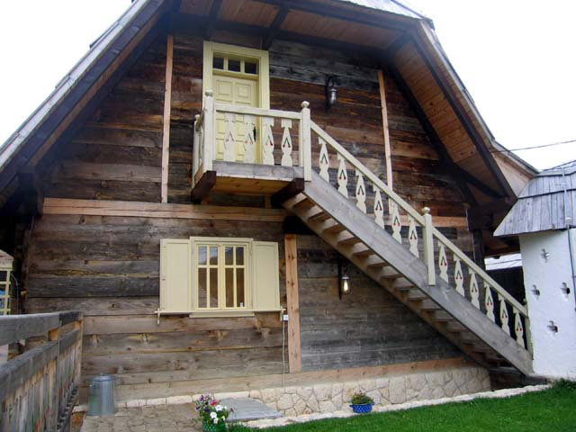 Биоскоп у Дрвенграду.